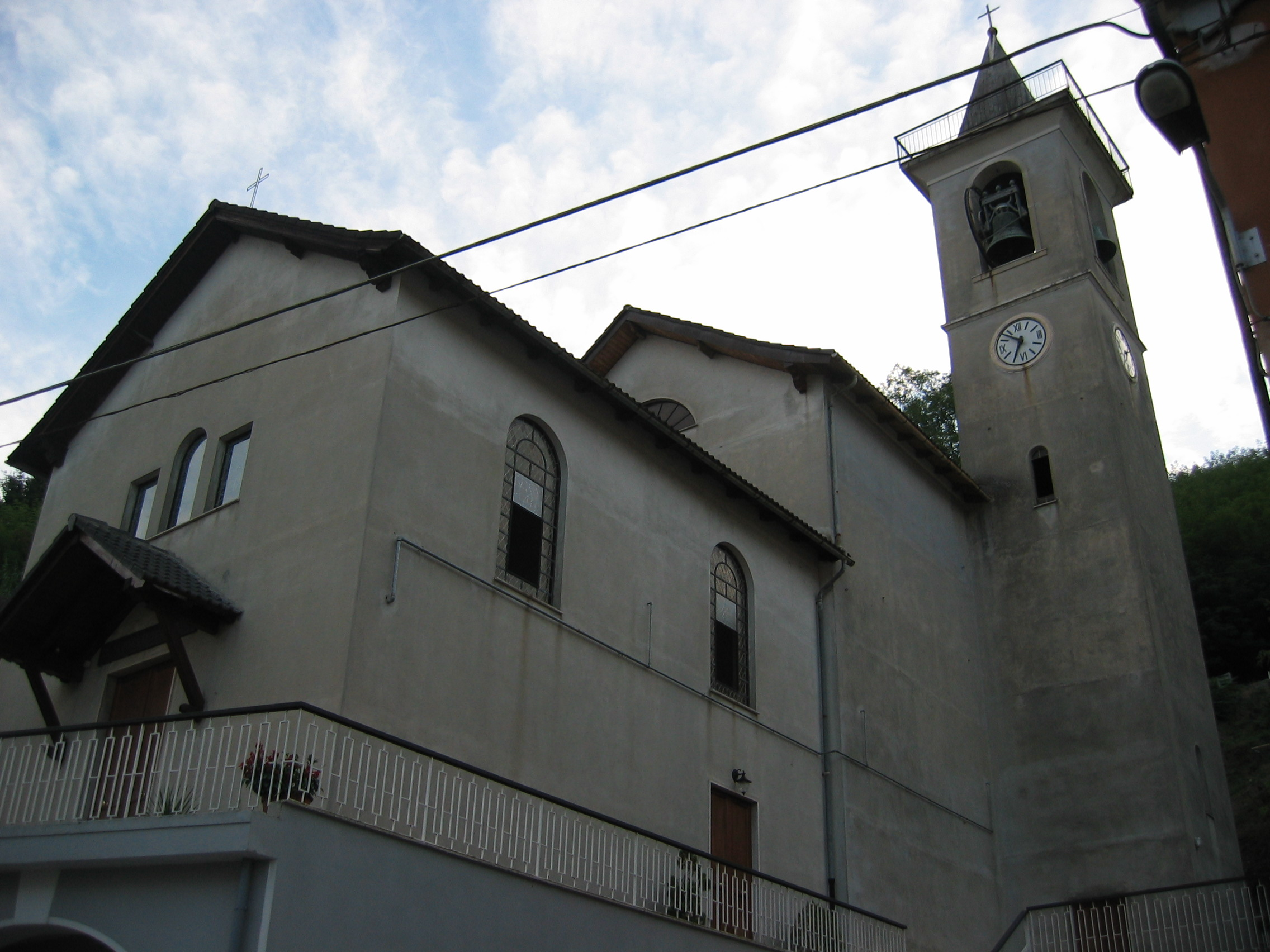 Chiesa parrocchiale di SS. Nome di Gesù in Bolzaneto, ai piedi del Monte Figogna, luogo in cui è costruito il Santuario di N.S. della Guardia (Genova)